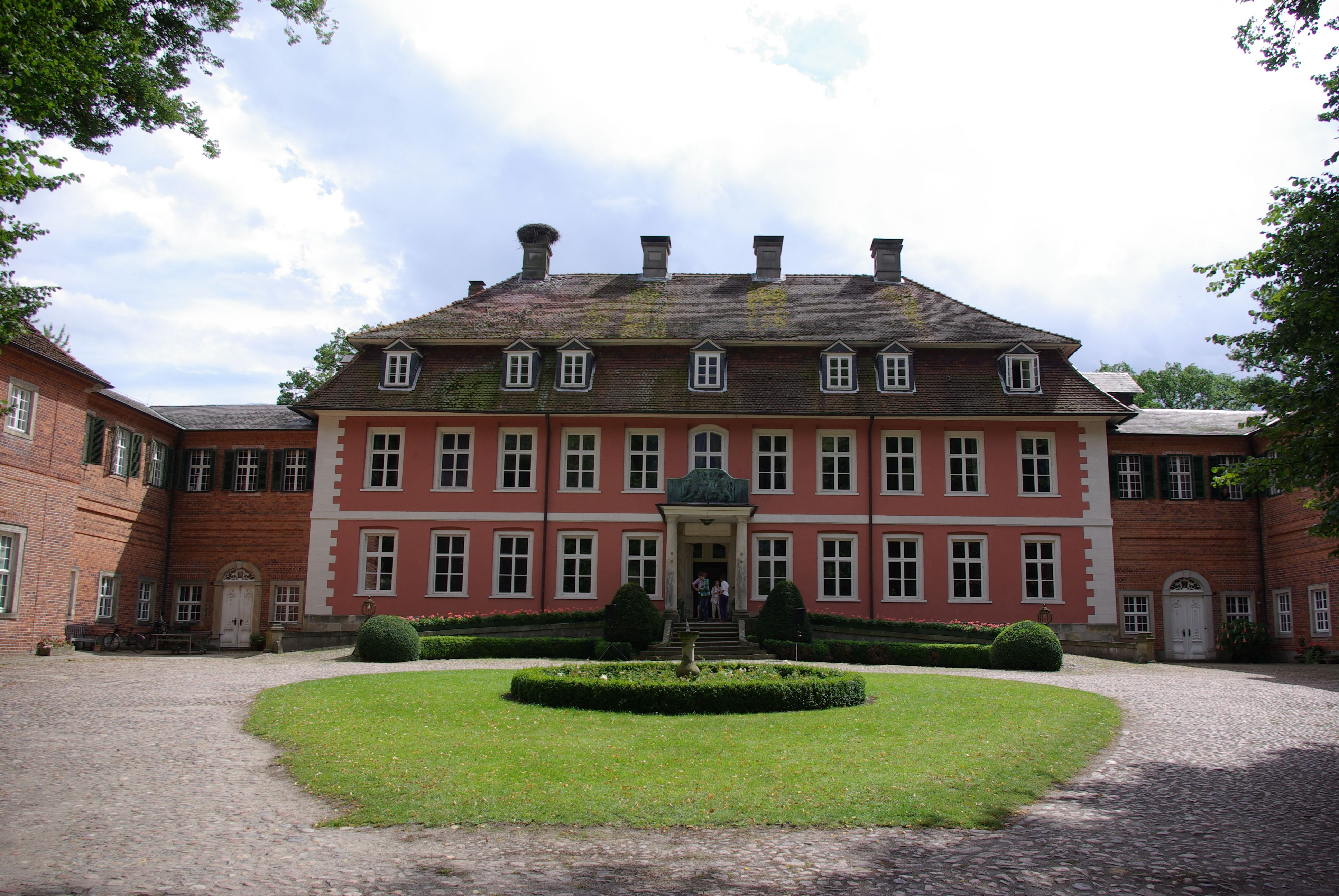 Gartow im Landkreis Lüchow-Dannenberg. Das Schloss Gartow steht unter Denkmalschutz.